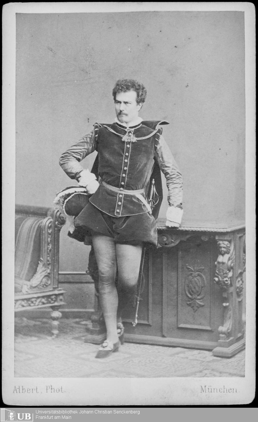 Hilmar Knorr, Rollenbild als Fiesco